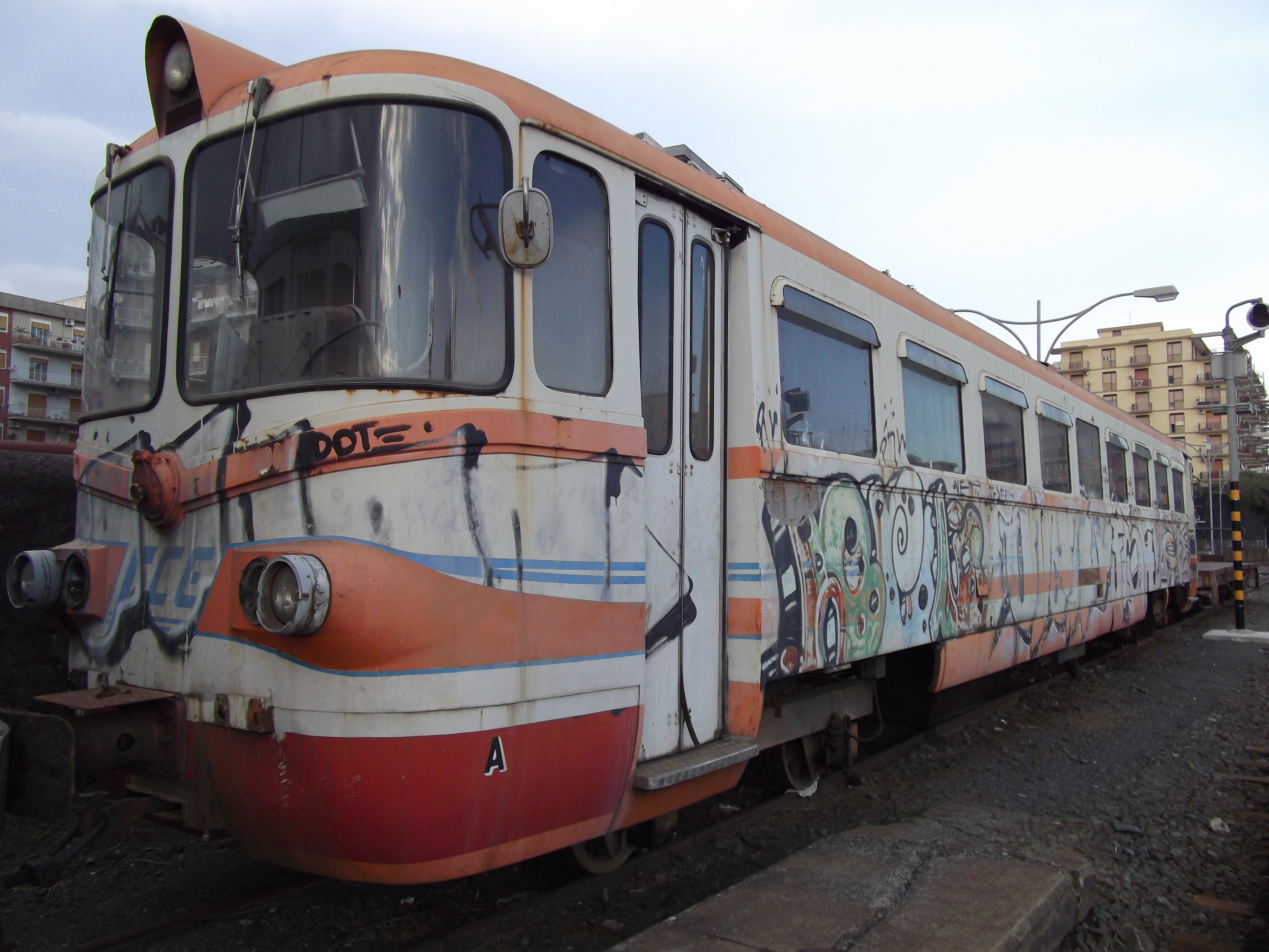 Automotrice RALn 6401 Accantonata nella stazione di Catania Borgo.